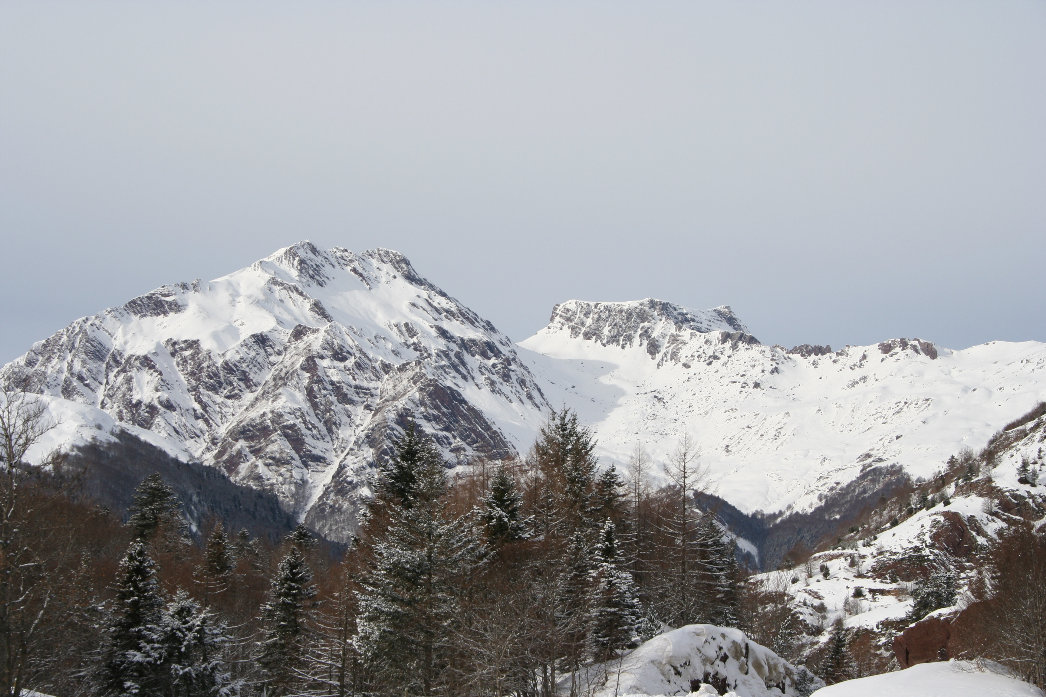 Vista desde el norte. This is a photography of a Site of Community Importance in Spain with the ID: ES2410003. Natura2000 entry, EEA entry